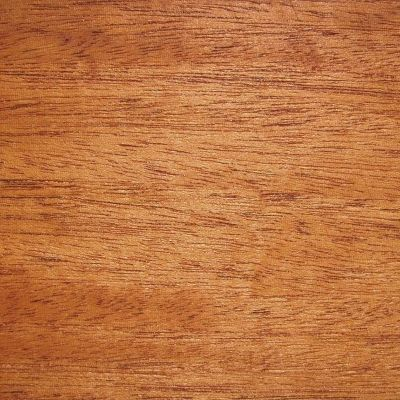 Mahagóni (Swietenia macrophylla) faanyag metszete